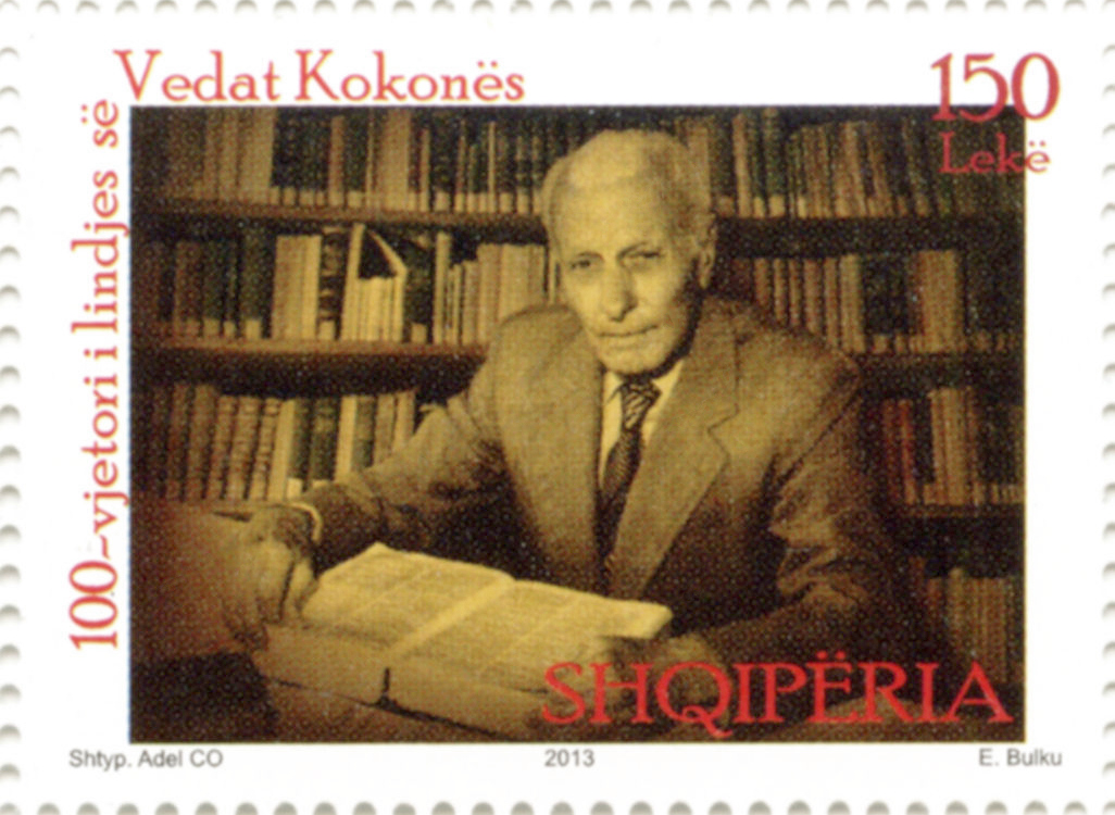 Vedat Kokona